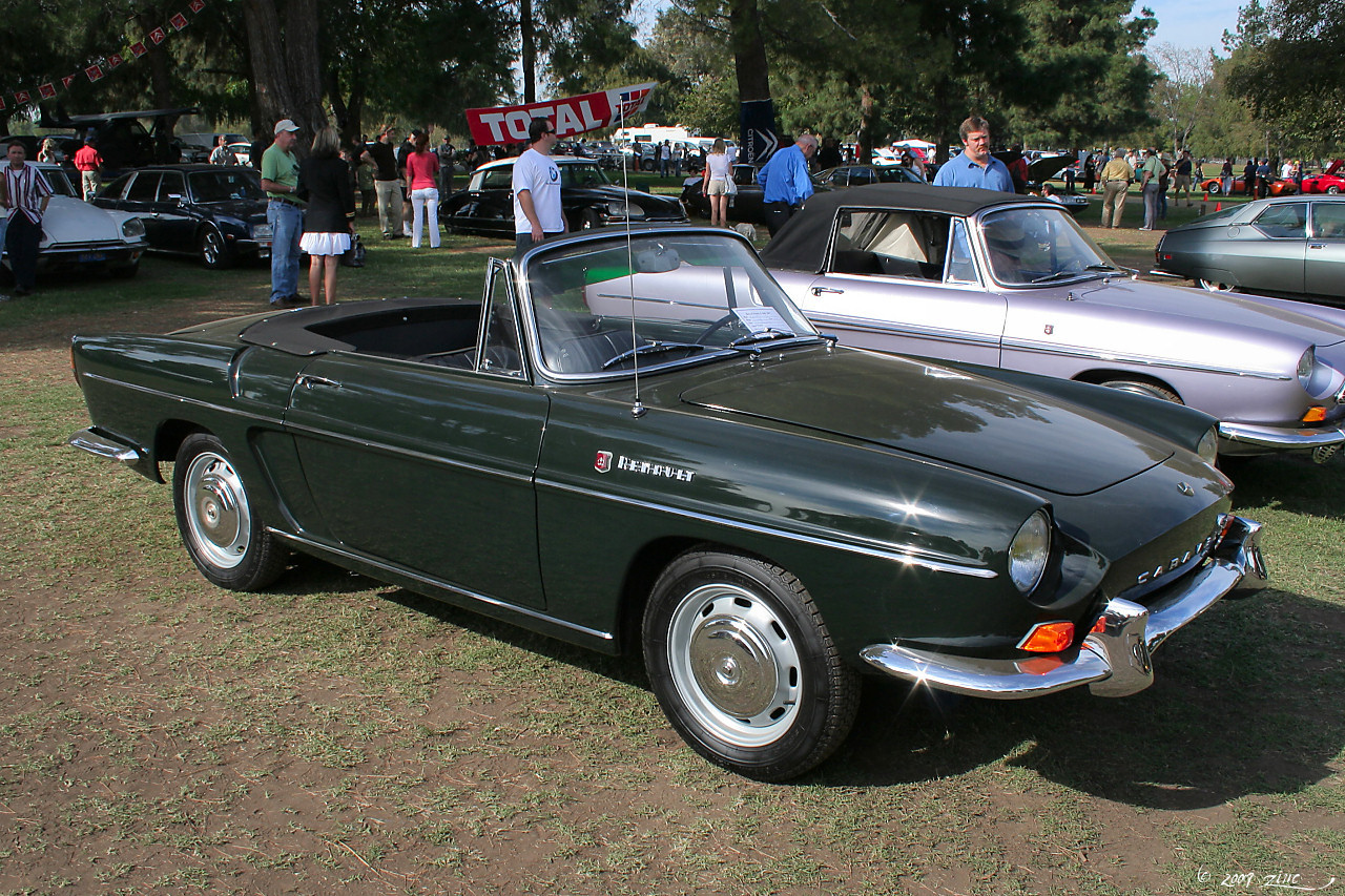 1967 Renault Caravelle cnv - fvr-1